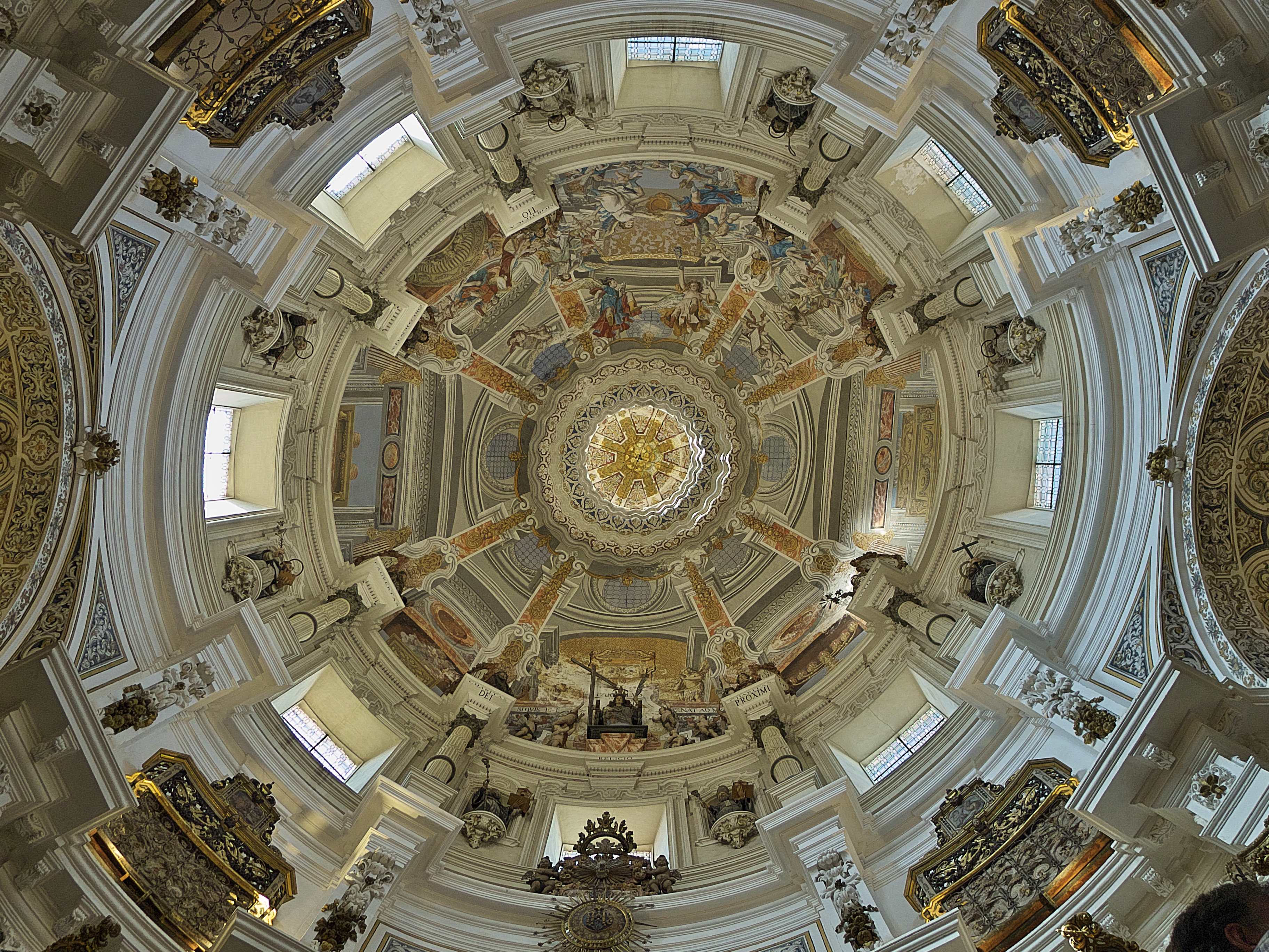 Noviciado de la Compañía de Jesús. Crucero de la Iglesia de San Luis de los Franceses, Sevilla. Extraordinaria bóveda del barroco universal (1719) por su arquitectura, decoración y simbolismo. Lucas Valdés desarrolla un programa pictórico en perspectiva siguiendo las directrices impuestas por el Concilio de Trento. Bóveda de Santa María en Vallicella (Roma) Bóveda de la Iglesia de Santa Agnese (Roma)